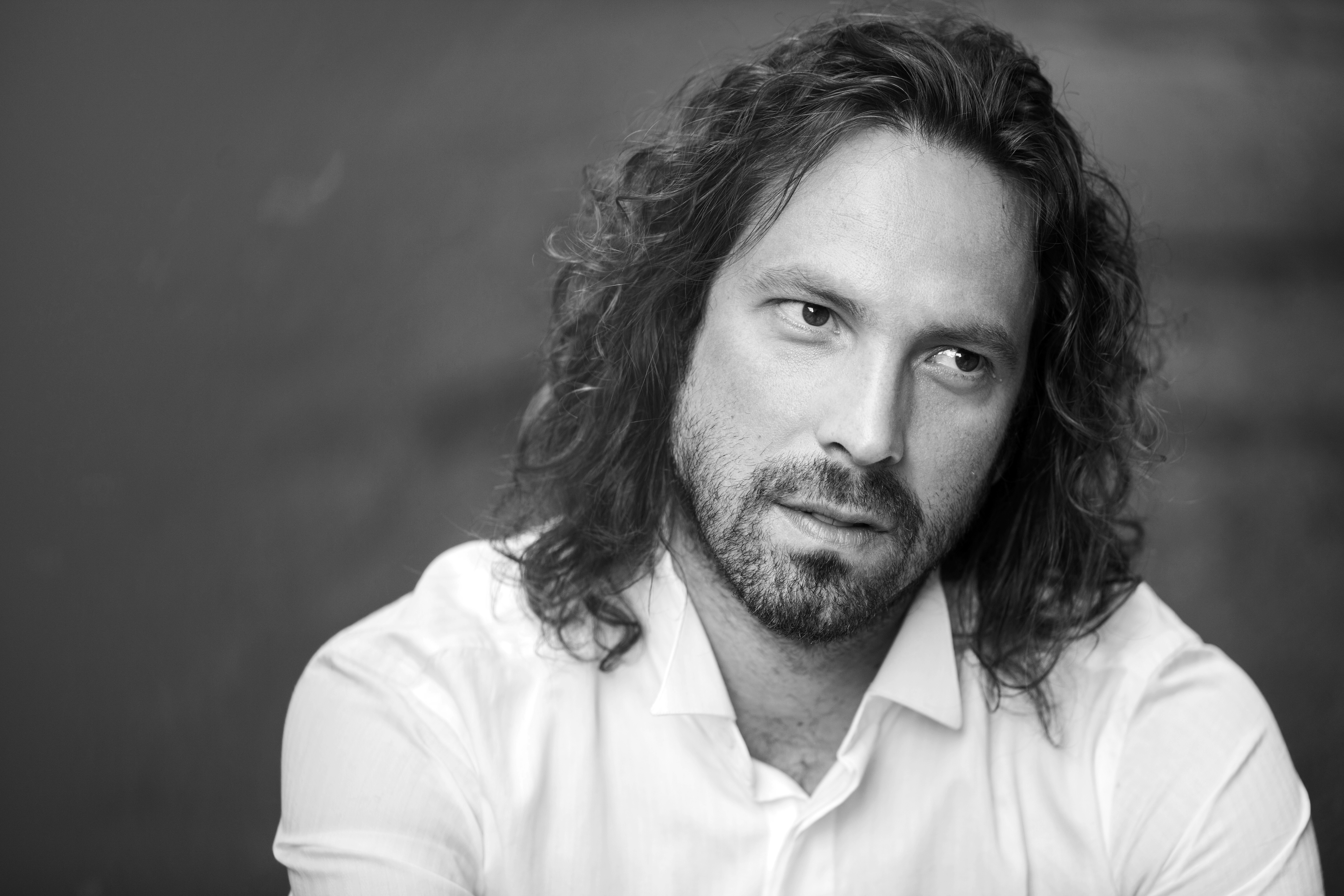 Ritratto di Simone Toni.